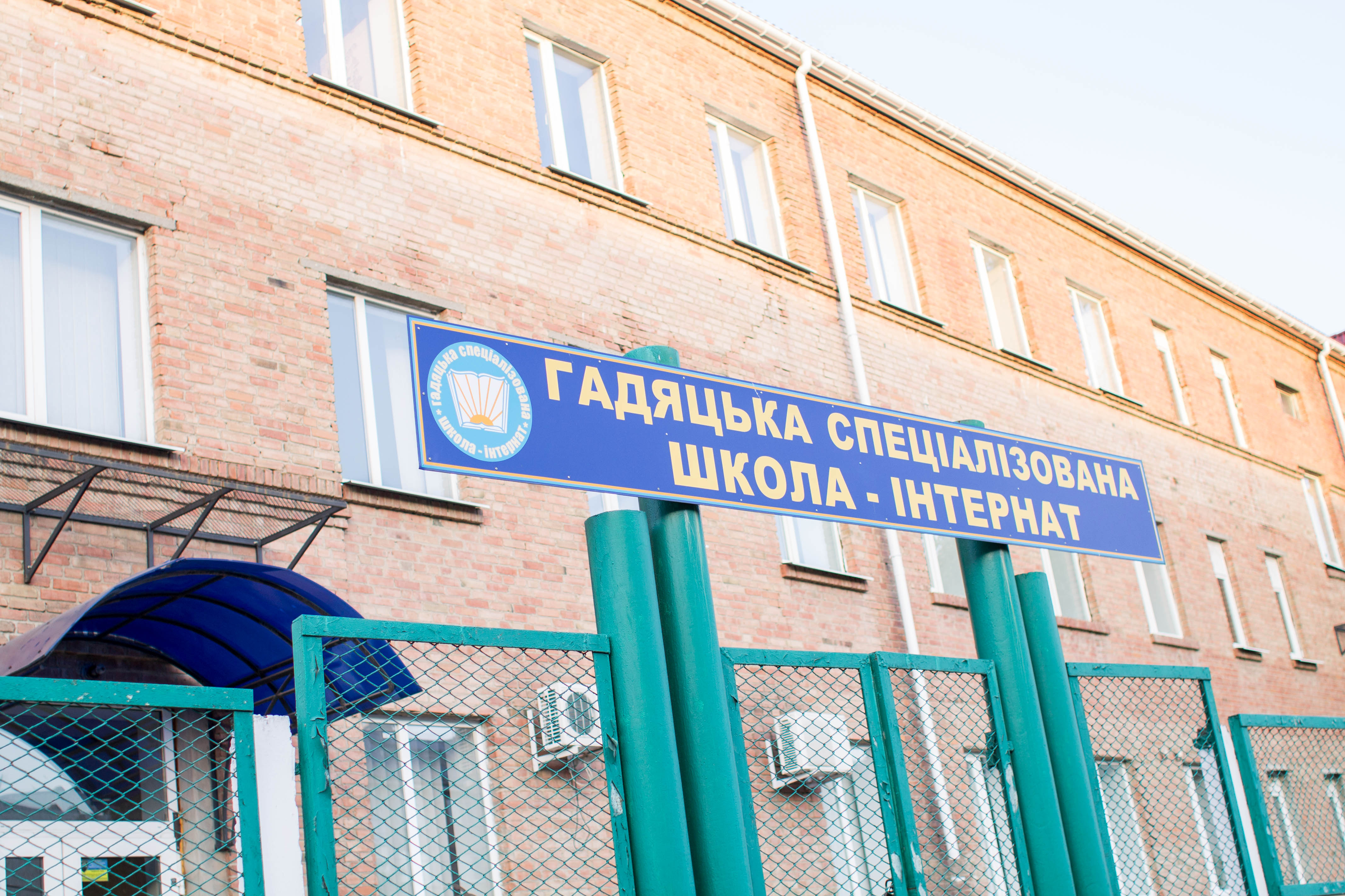 Гадяцька спеціалізована школа-інтернат